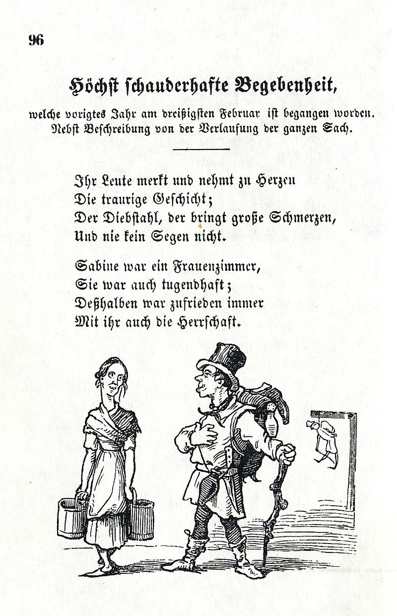 Erstdruck der Moritat von Sabine und dem Schuster